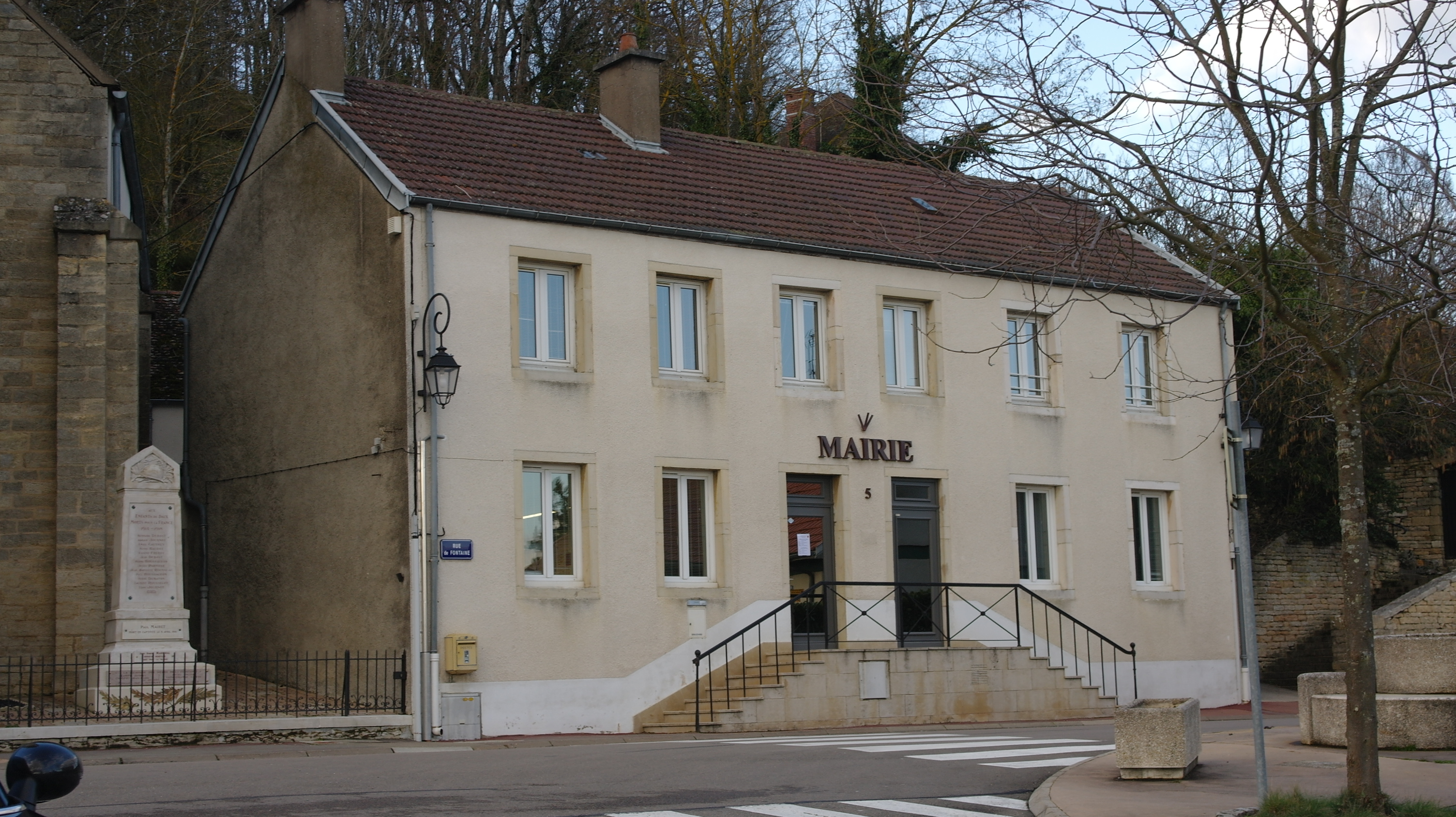 Mairie de Daix (Côte d'Or, France), avec le monument aux morts (à gauche)